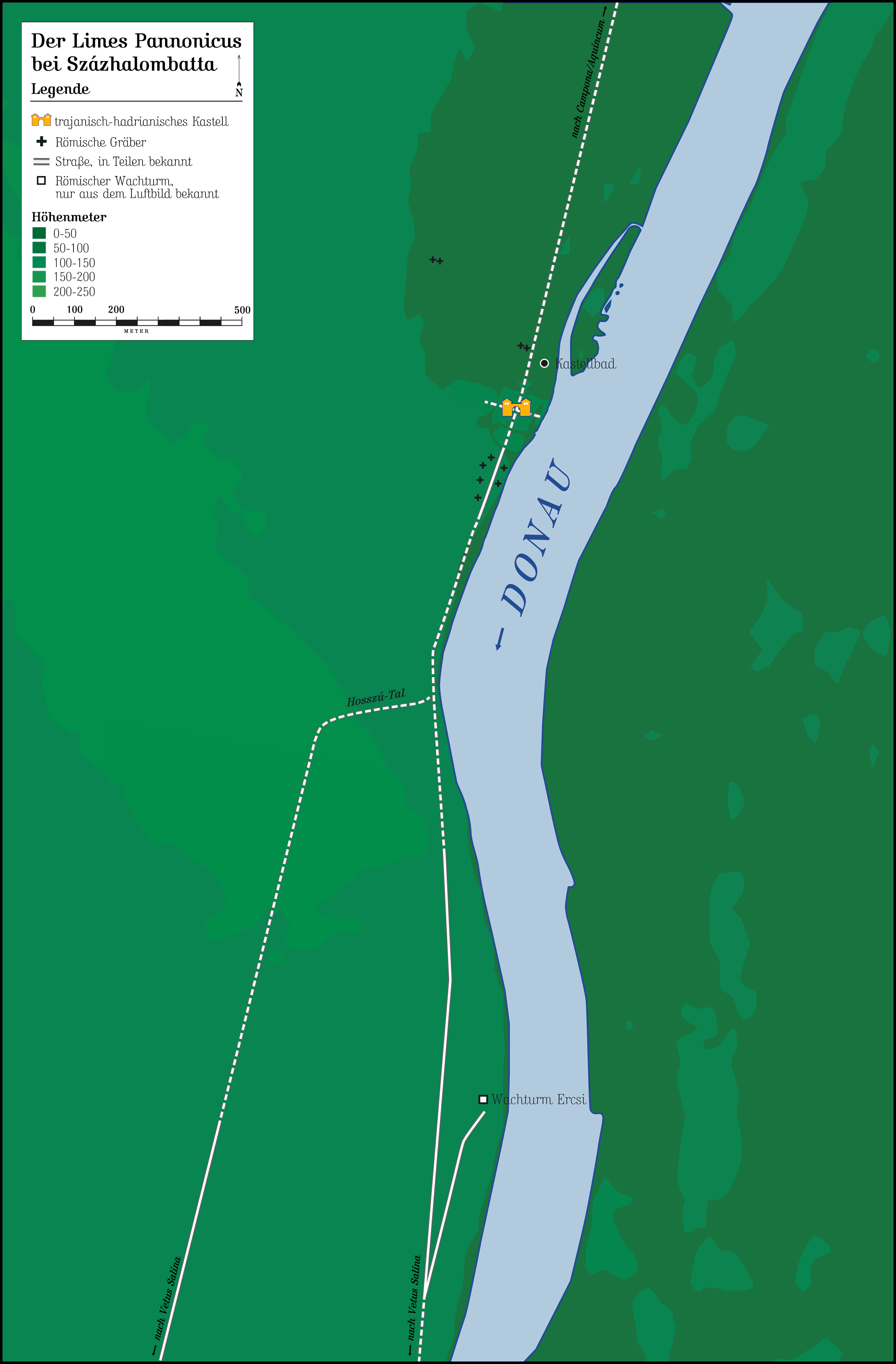 Kastell Százhalombatta-Dunafüred. Übersicht über den bekannten und vermuteten Streckenverlauf der Limesstraße und des Kastells mit seiner Infrastruktur. Quellen: Zsolt Visy: „Der pannonische Limes in Ungarn.“ Konrad Theiss Verlag, Stuttgart 1988, ISBN 3806204888; Judit Topál: „The Southern Cemetery of Matrica (Százhalombatta-Dunafüred).“ Akadémiai Kiadó, Budapest 1981; Zsolt Visy: „The ripa Pannonica in Hungary.“ Akadémiai Kiadó, Budapest 2003, ISBN 9630579804.